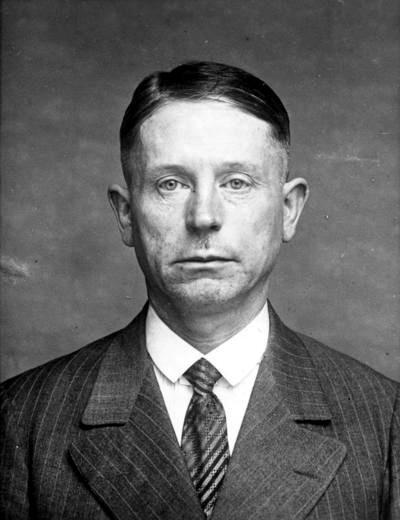 Zu dem grossen Prozess gegen Peter Kürten, dem Massenmörder von Düsseldorf, welchem 9 Morde und 7 Mordversuche zur Last gelegt werden. Polizeiaufnahme des Massenmörders Peter Kürten.